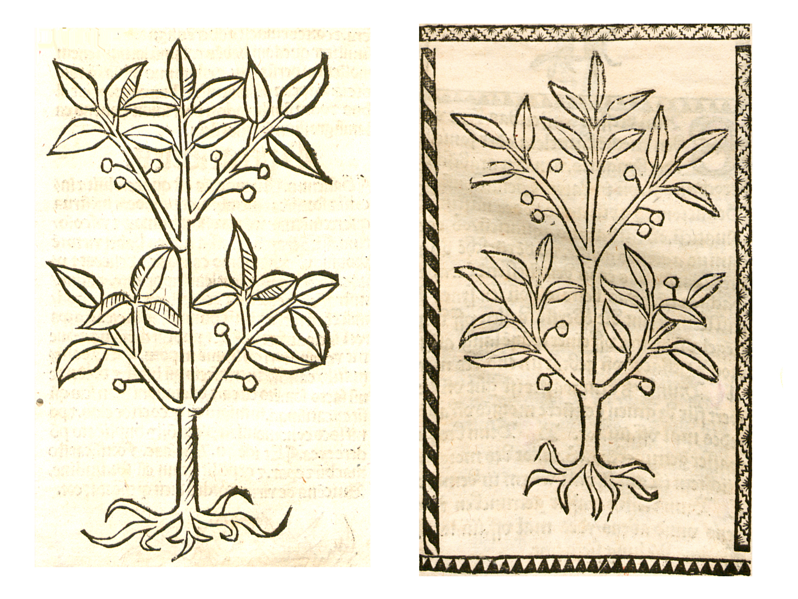 Abbildung von Beyn höltzin (Ligustrum vulgare)